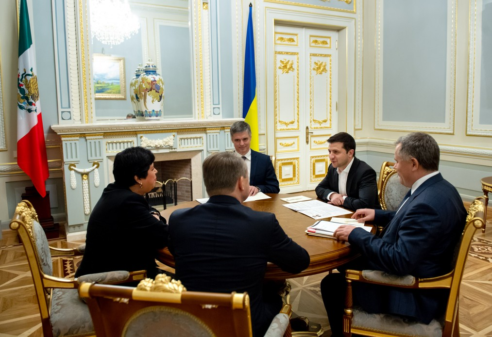 Президент України Володимир Зеленський прийняв вірчі грамоти у послів низки іноземних держав: Мексики – Ольга Беатріс Гарсія Гійен